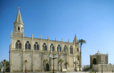 Santuario de Nuestra Señora de la Regla, Chipiona, Cádiz, España